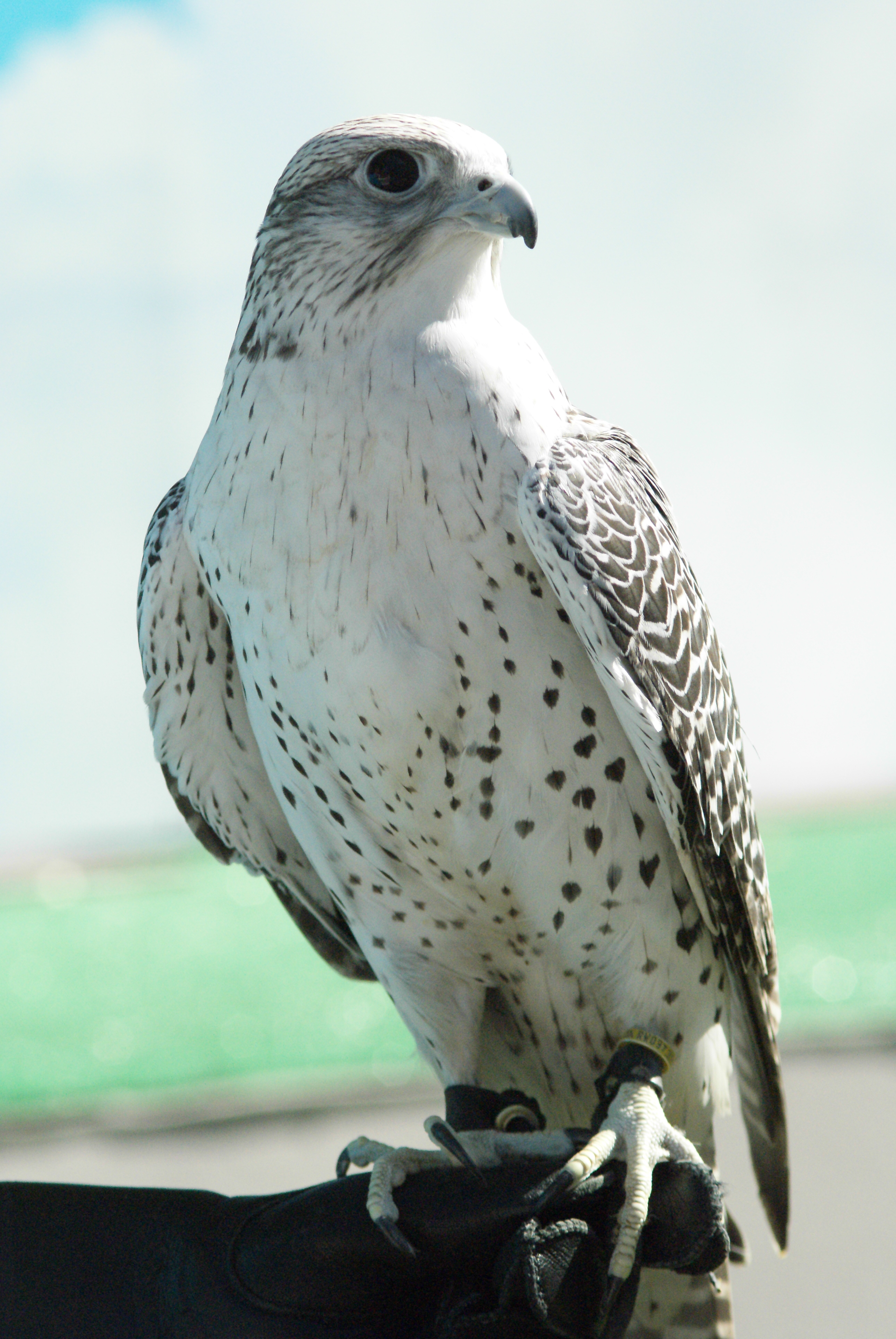 Falco rusticolus Gyrfalcon